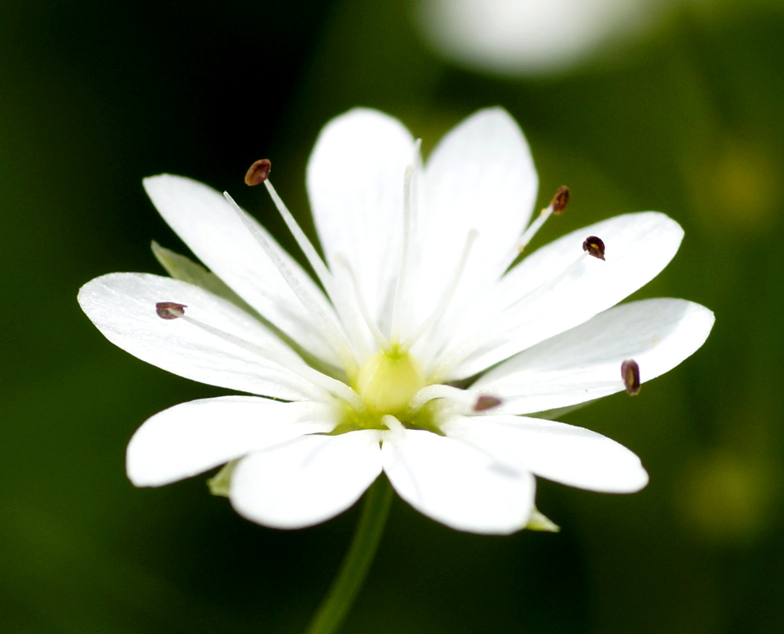 Gras-Sternmiere, Caryophyllaceae, Deutschland, Bayern, Oberfranken, Selbitz Foto: U.Schmidt, VII.2012